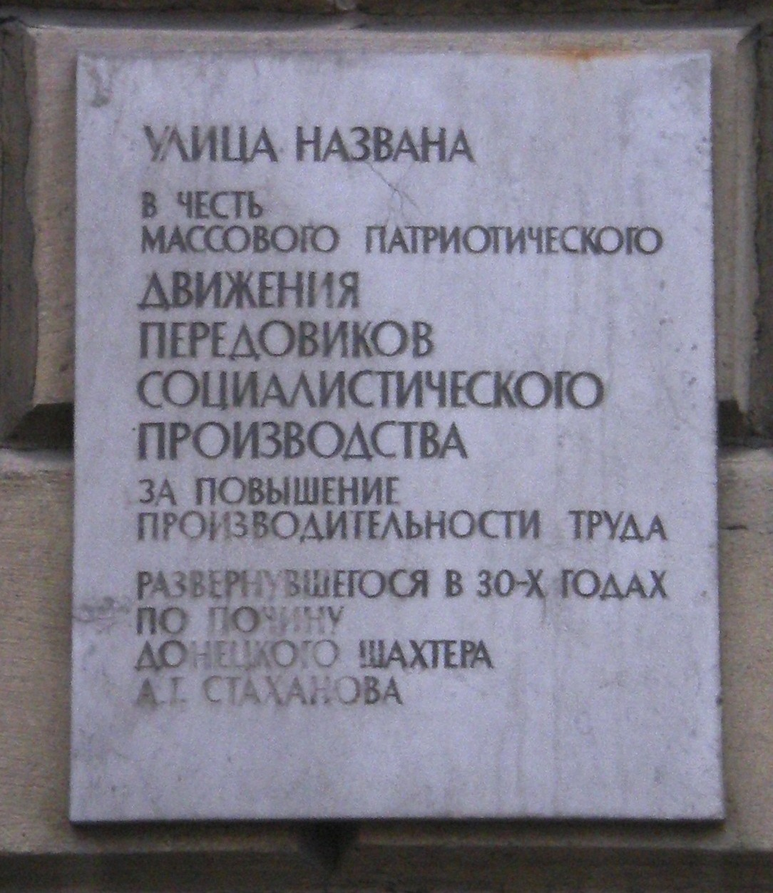 Улица Стахановцев, мемориальная доска.